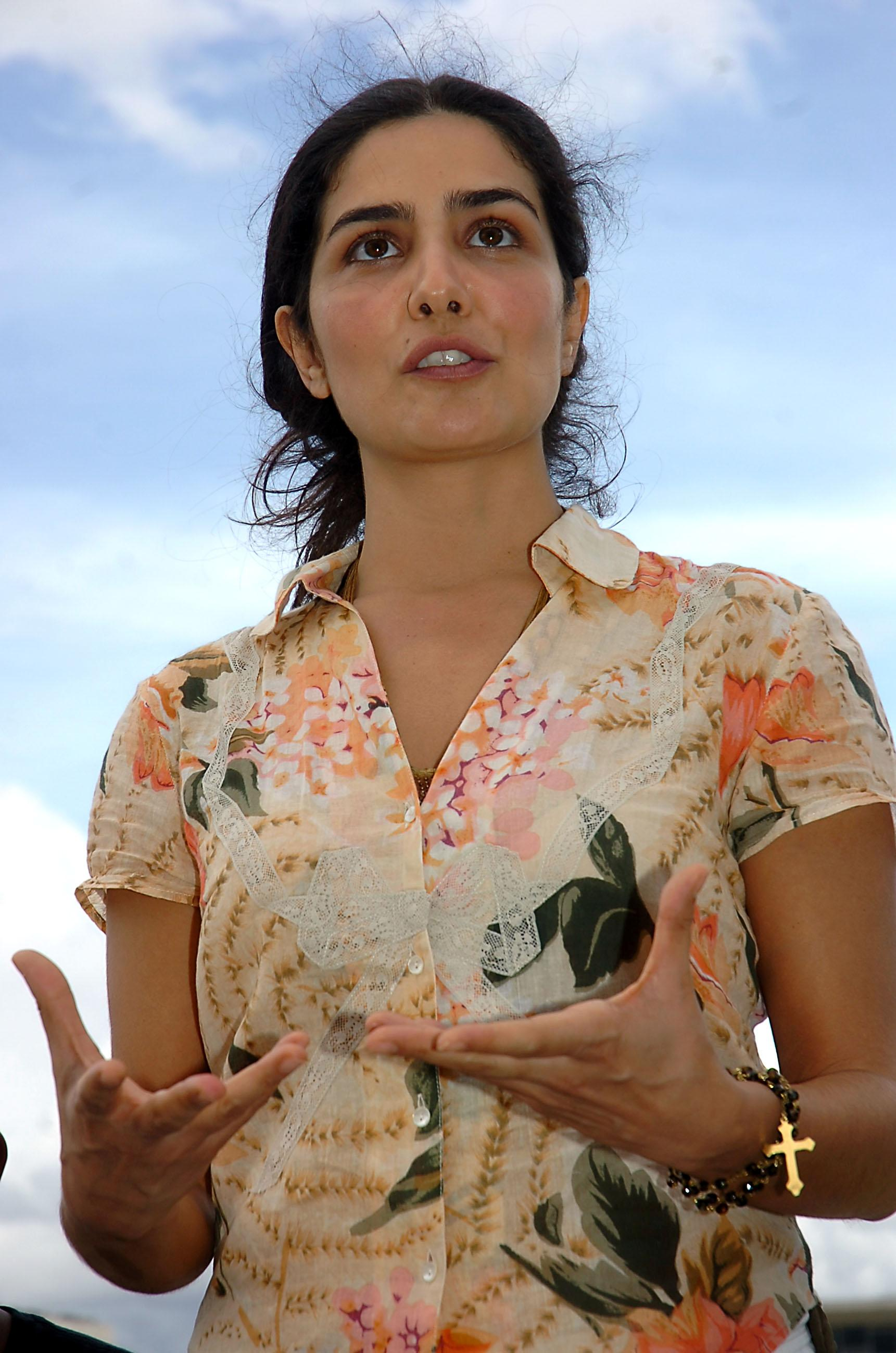 Atriz Letícia Sabatella, integrante da organização Humanos Direitos, fala à imprensa sobre greve de fome de dom Luiz Flávio Cappio, que pede a suspensão das obras de transposição do Rio São Francisco Foto: José Cruz/ABr